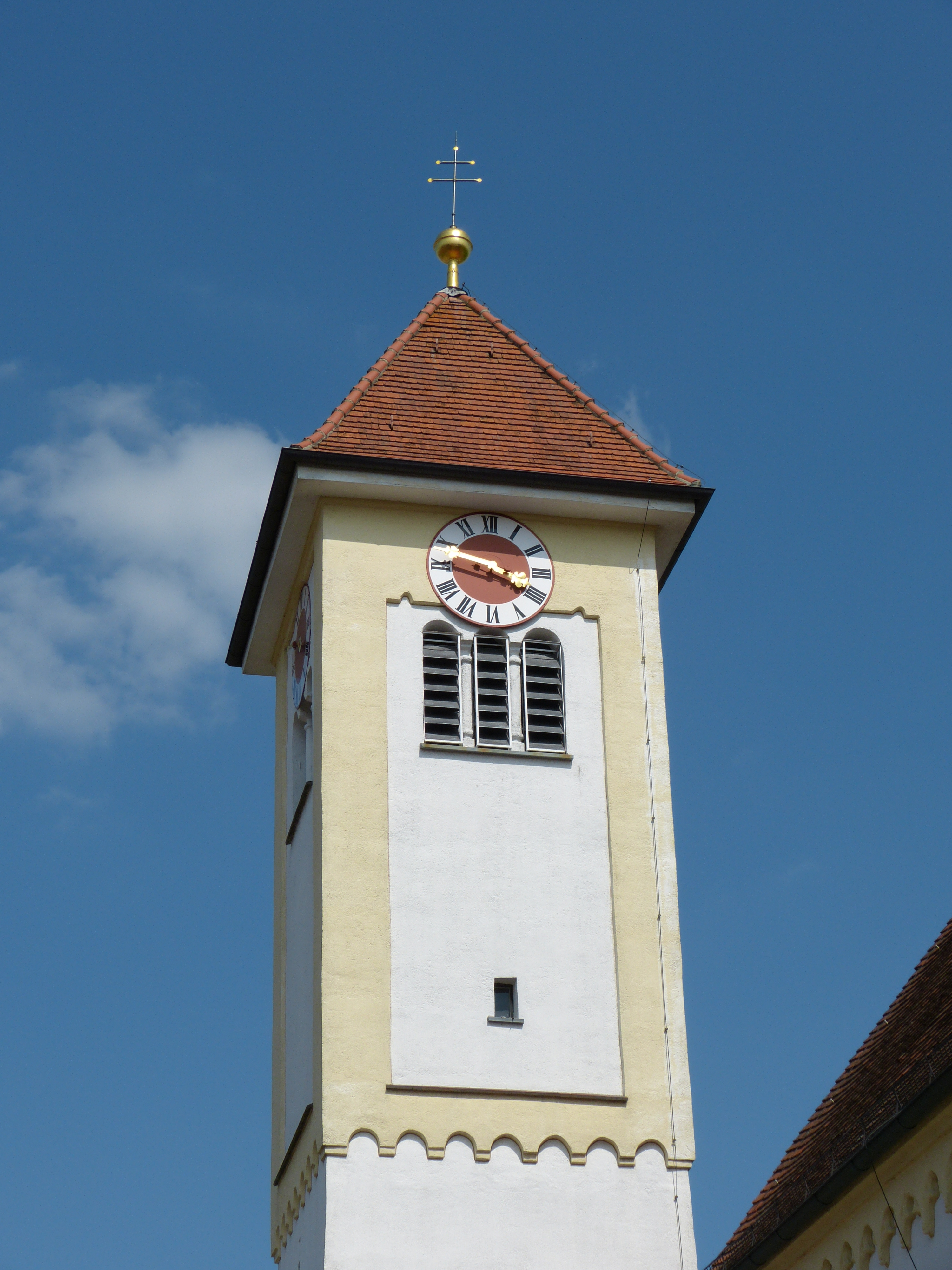 Mariä Himmelfahrt, Markt Wald, Landkreis Unterallgäu, Bayern, Deutschland